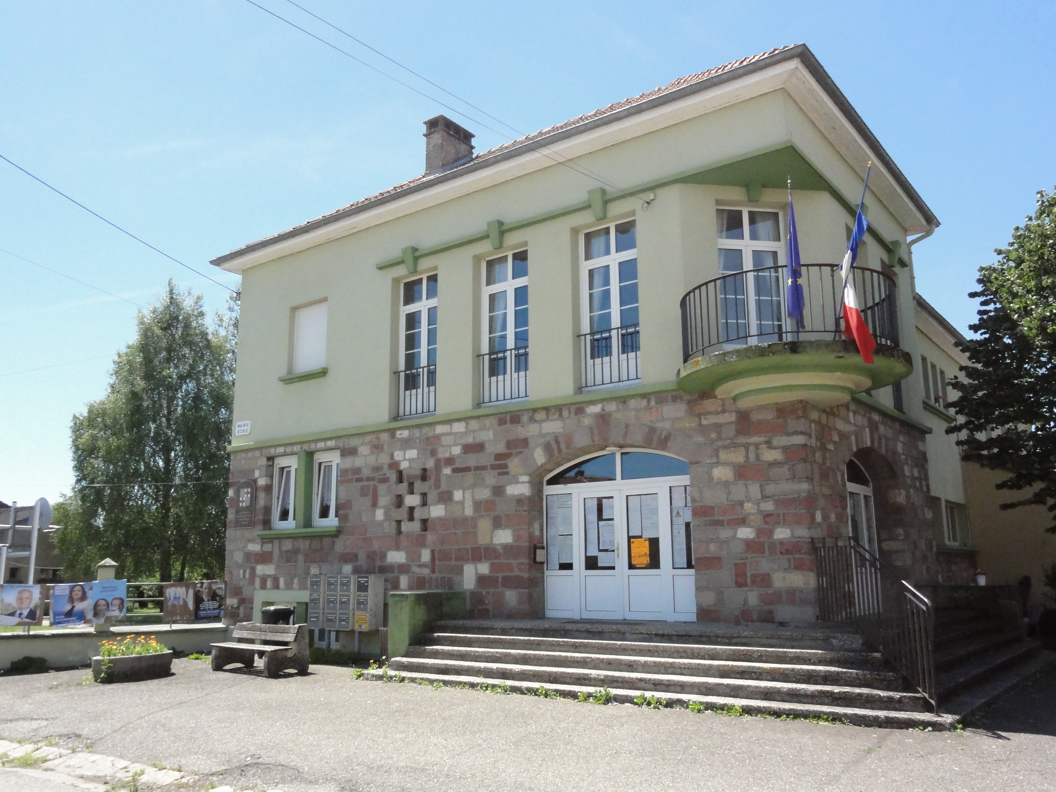 Mulcey (Moselle) mairie - école